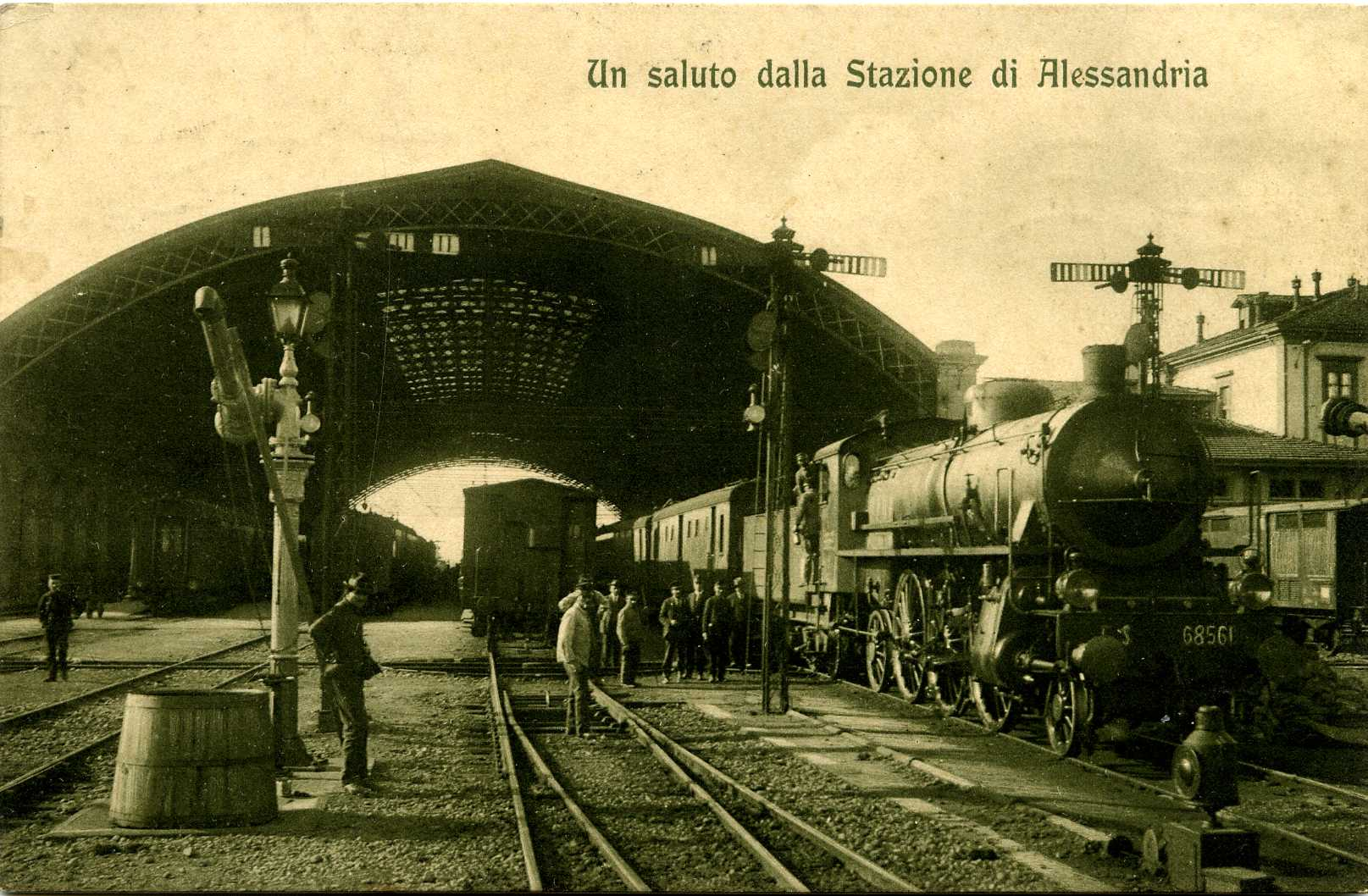 Collezione di Tony Frisina - Alessandria